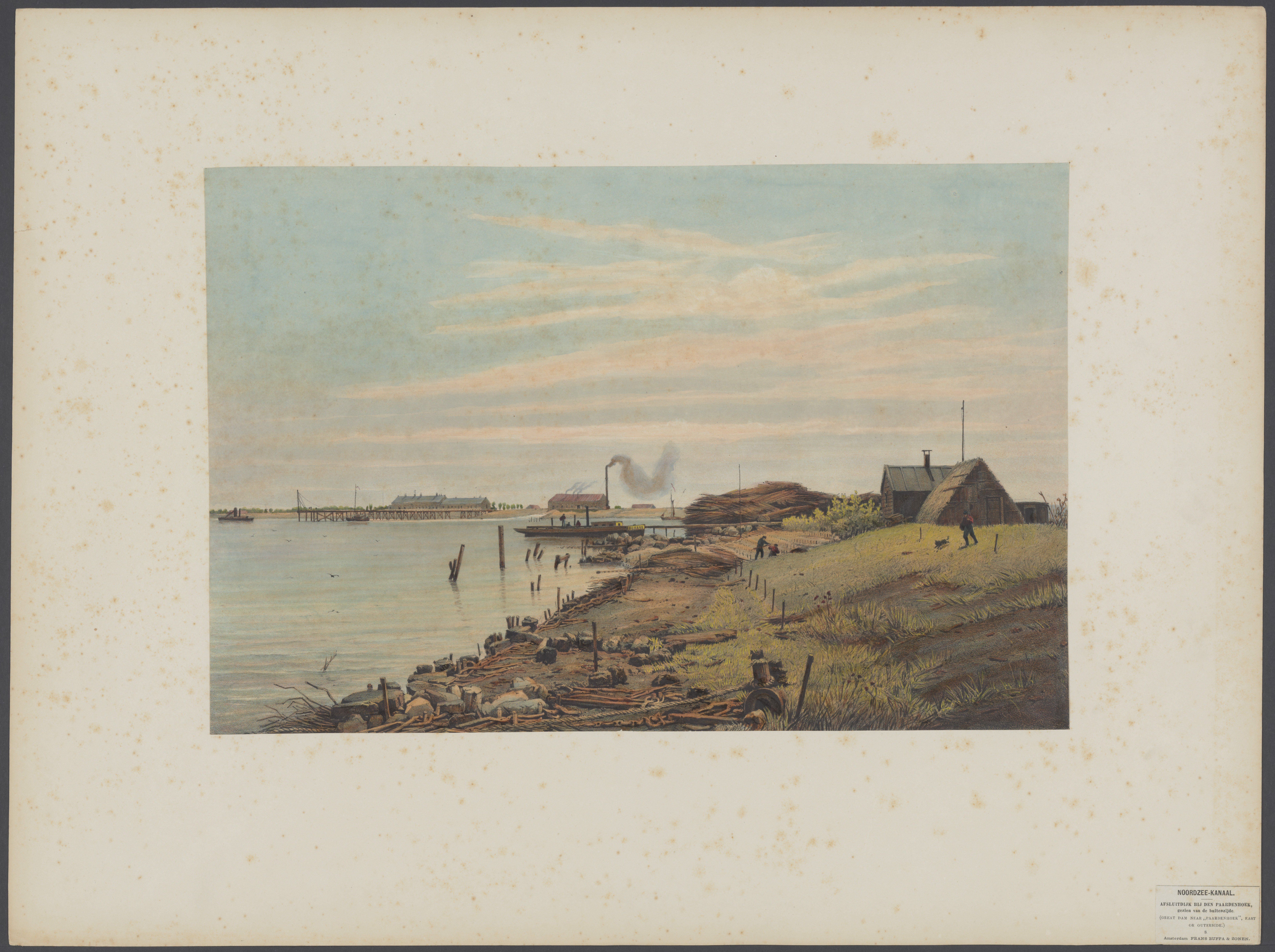 Collectie / archief : Fotocollectie Rijkswaterstaat : Metadata : Collectie / Archief : Fotocollectie Rijkswaterstaat Reportage / Serie : Noordzeekanaal Beschrijving : Afsluitdijk bij de Paardenhoek, gezien van de buitenzijde. (Great dam near "Paardenhoek", east or outerside) Annotatie : De noordpunt van het Zeeburgereiland bij de Oranjesluizen stond bekend als de Paardenhoek Datum : {1870-1875} Locatie : Amsterdam, Amsterdam, Noord-Holland, Noord-Holland Trefwoorden : afsluitdijken, kanalen Fotograaf : [onbekend] Auteursrechthebbende : Public Domain logo Materiaalsoort : Foto (zwart/wit) Nummer archiefinventaris : bekijk toegang 2.24.11 Inventarisnummer : 63 Bestanddeelnummer : 546